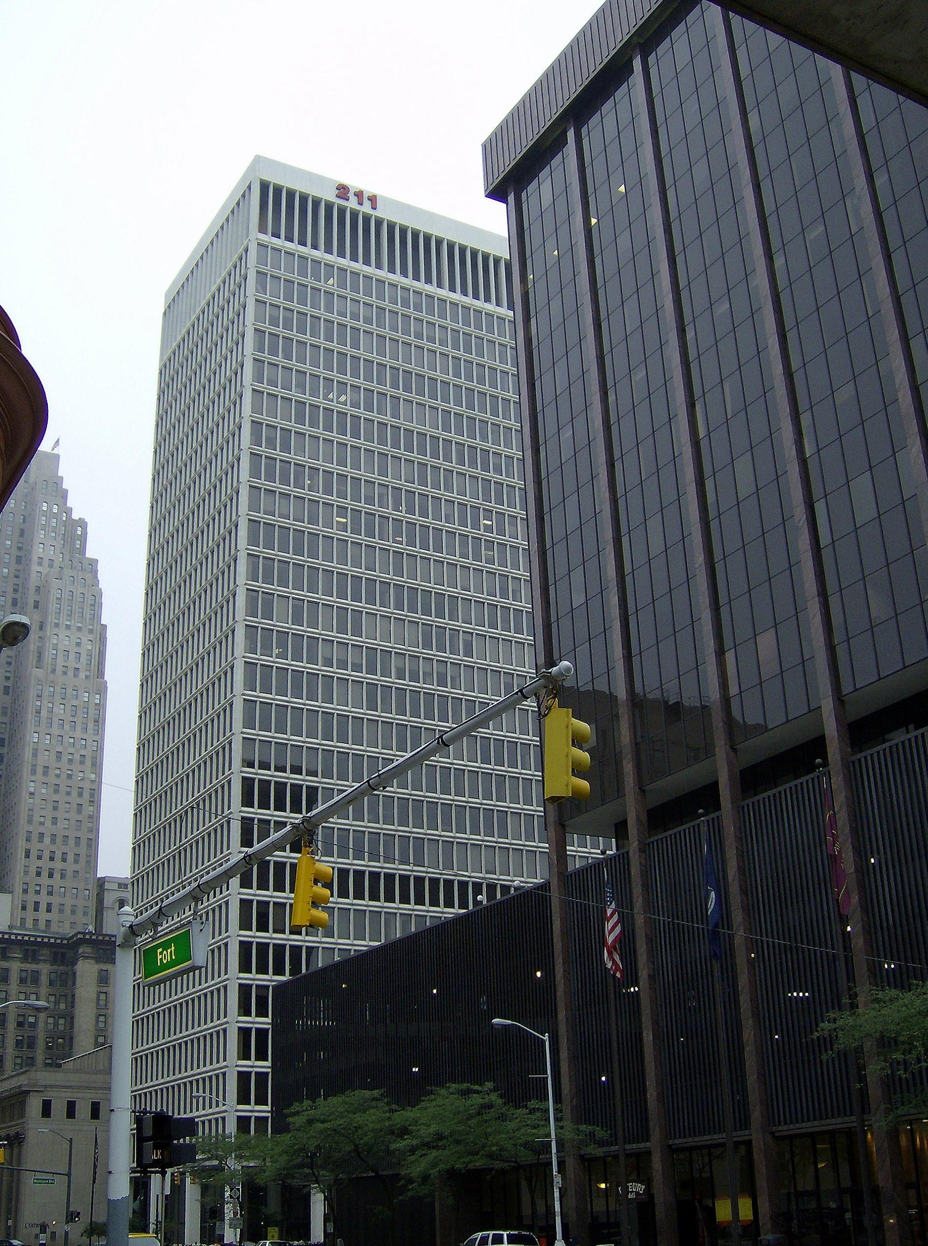 211 Fort from Fort St., detroit